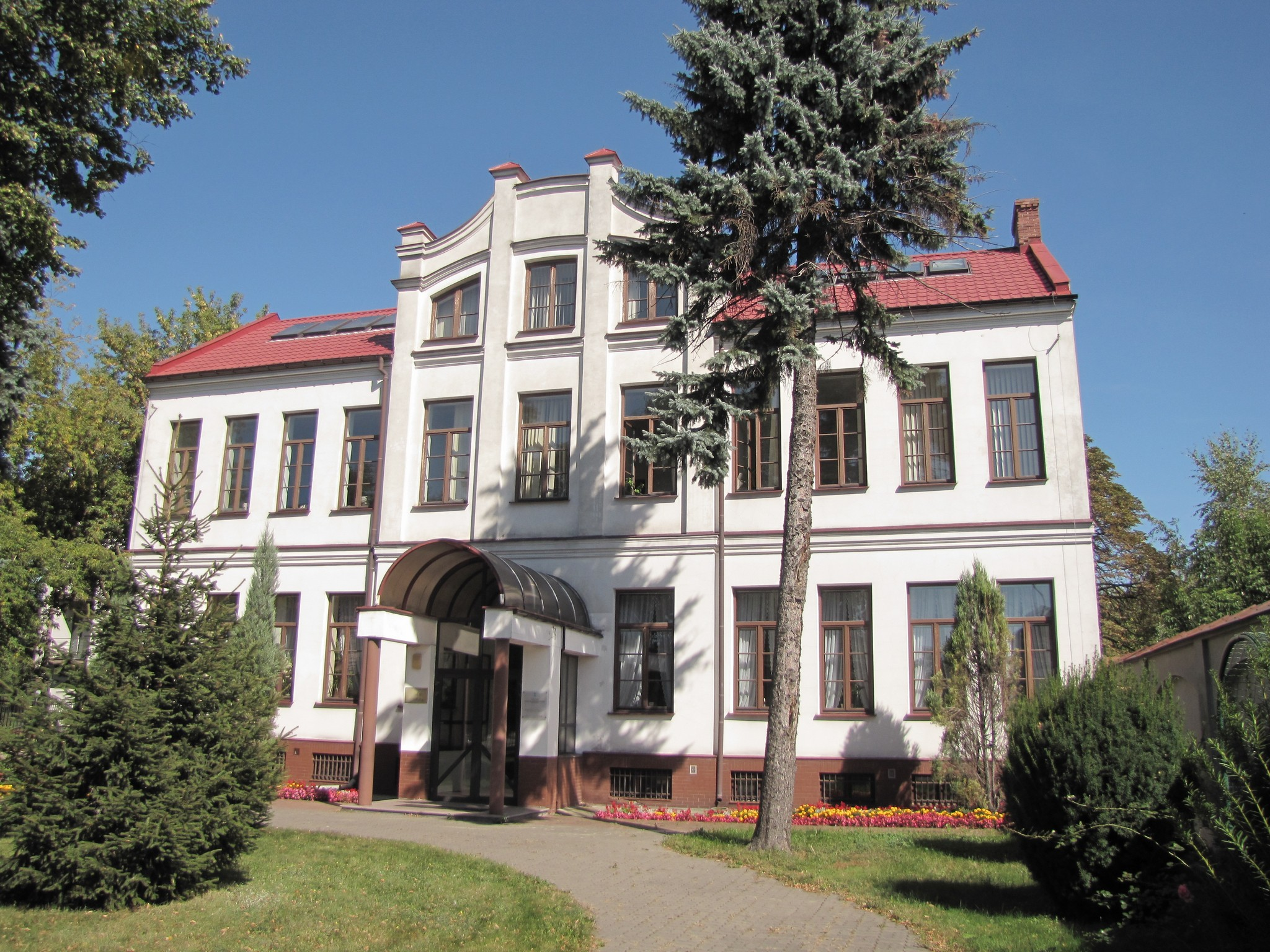 Biała Podlaska - dawny szpital żydowski, ob. Urząd Stanu Cywilnego, 1905